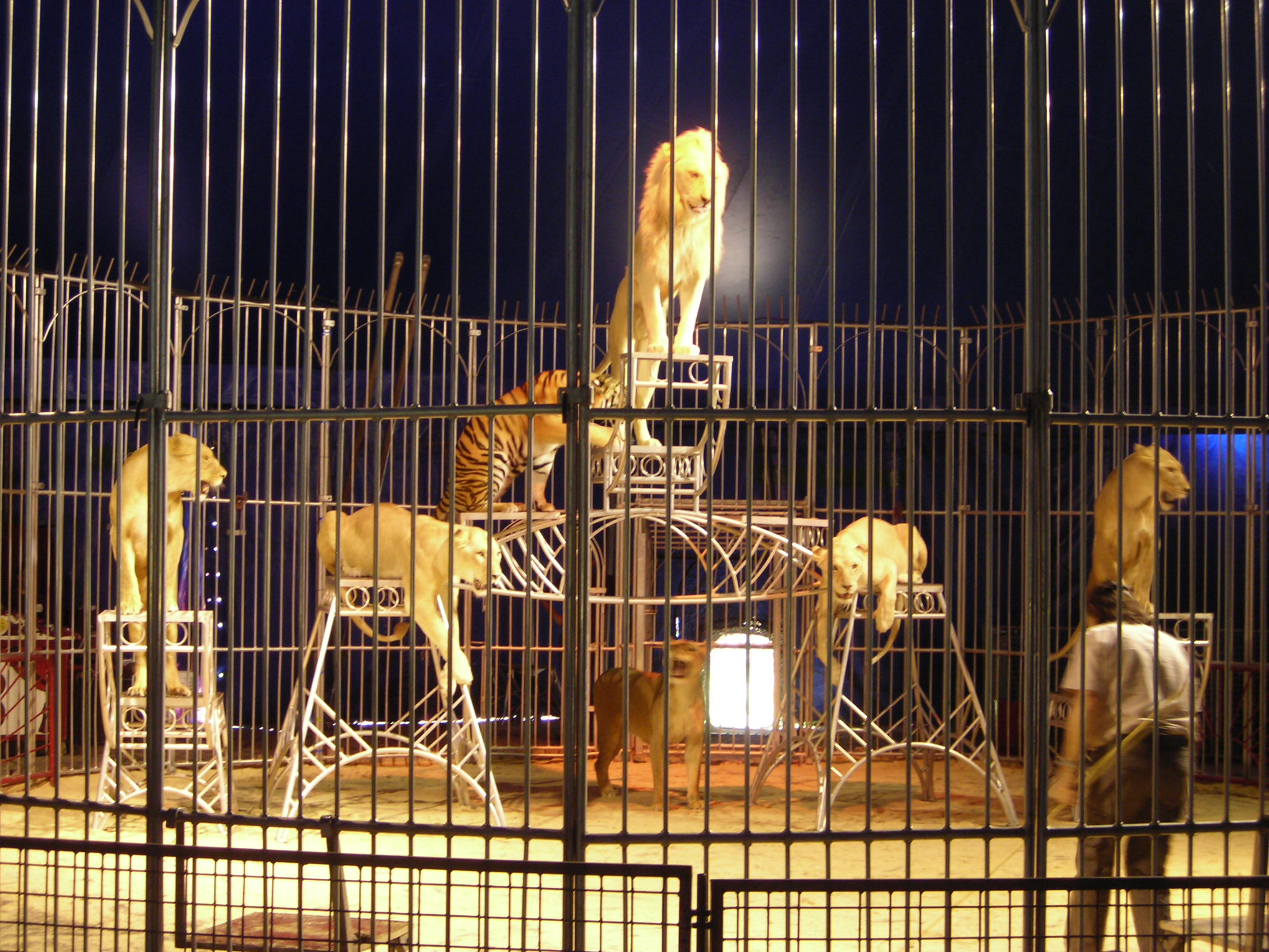 Fauves Bagatelle